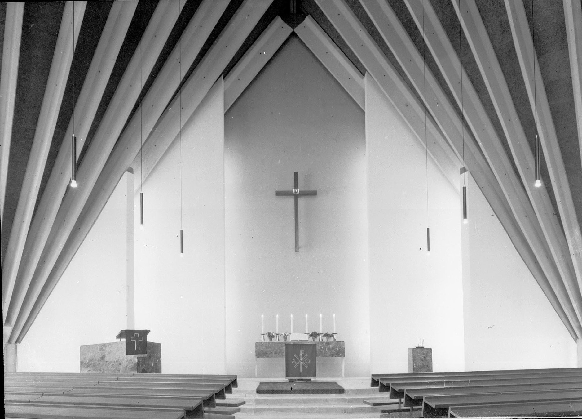 [Auferstehungskirche in Innsbruck / Tirol]